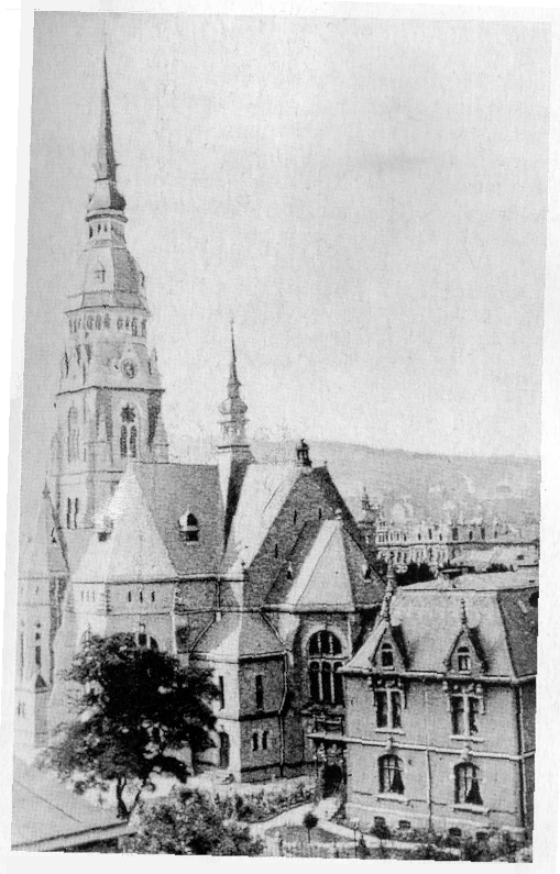 Bildbeschreibung: Gemarker Kirche 1890 Quelle: selbst gescannt Die Urheberrechts-Schutzdauer des hier abgebildeten Kunstwerks ist weltweit abgelaufen, da der Künstler bereits seit über 70 Jahren tot ist. Es ist somit gemeinfrei („public domain“). Ebenfalls gemeinfrei ist die vorliegende fotografische Wiedergabe des flächigen Werkes, da sie keine eigene Schöpfungshöhe aufweist.